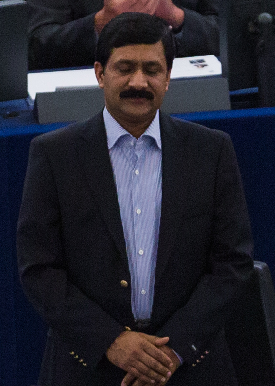 Depicted people: Ziauddin Yousafzai, Malala Yousafzai and Martin Schulz